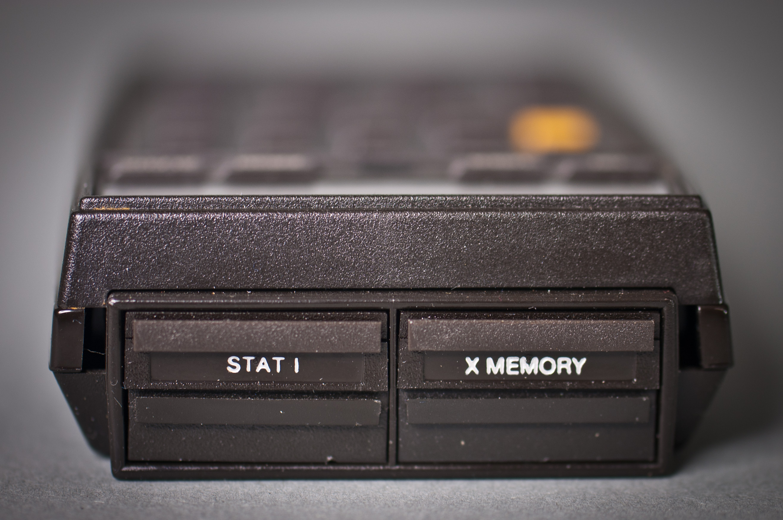 Erweiterungsslots des HP-41CX mit einem Statistikmodul und enem X Memory Modul (Speichererweiterung). Die beiden unteren Slots (#3 und #4) sind nicht belegt.